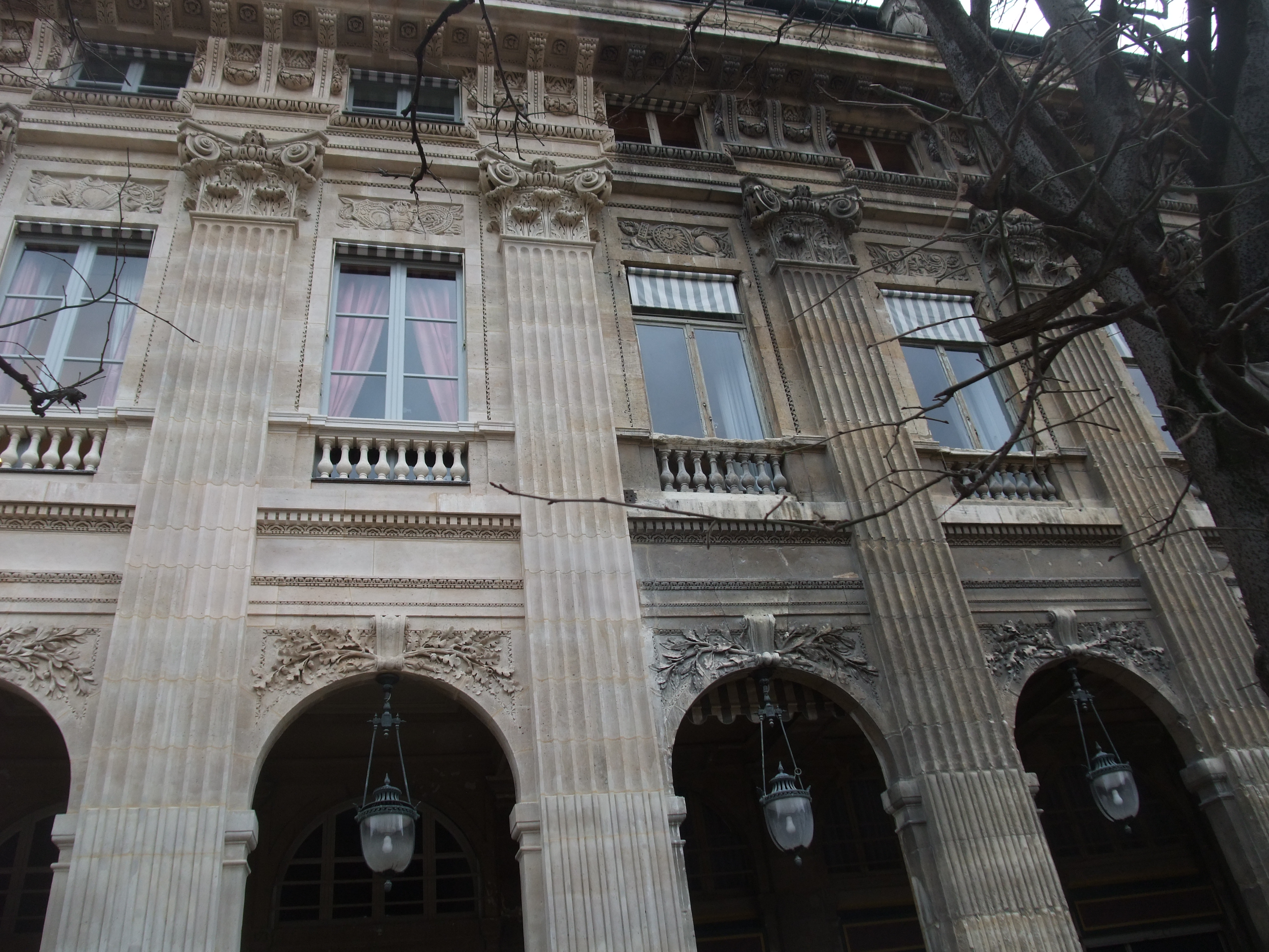 Restauration en cours des façades sur jardin du Palais-Royal (Paris 2012)